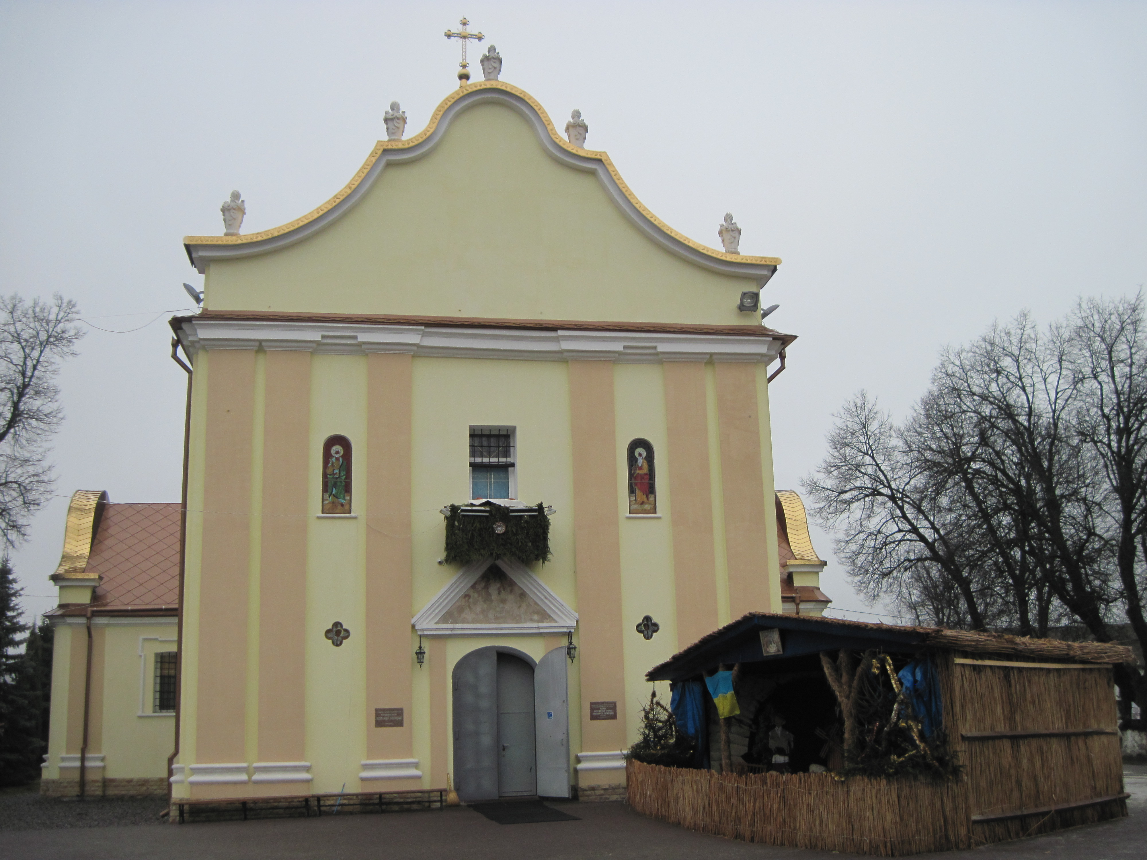 Фасад церкви Зарваниця, 2105